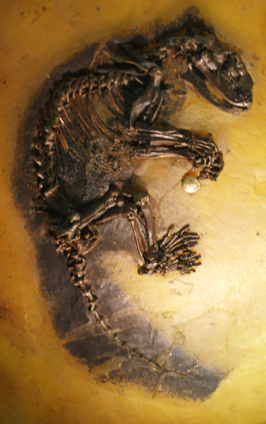 Fossil of Kopidodon, an extinct mammal- Took the photo at Senckenberg Museum of Frankfurt